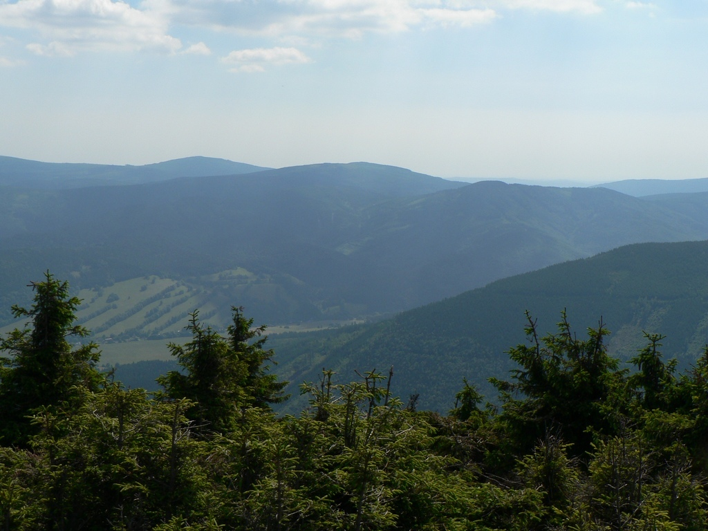 Medvědská hornatina s vrcholy Medvědí vrch (v pozadí) a Jelení Loučky (v popředí), pohled z Červené hory